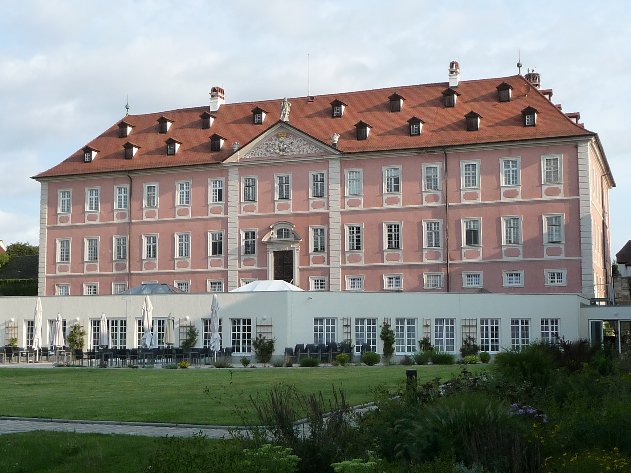 Schloss Reichmannsdorf im Landkreis Bamberg, Oberfranken